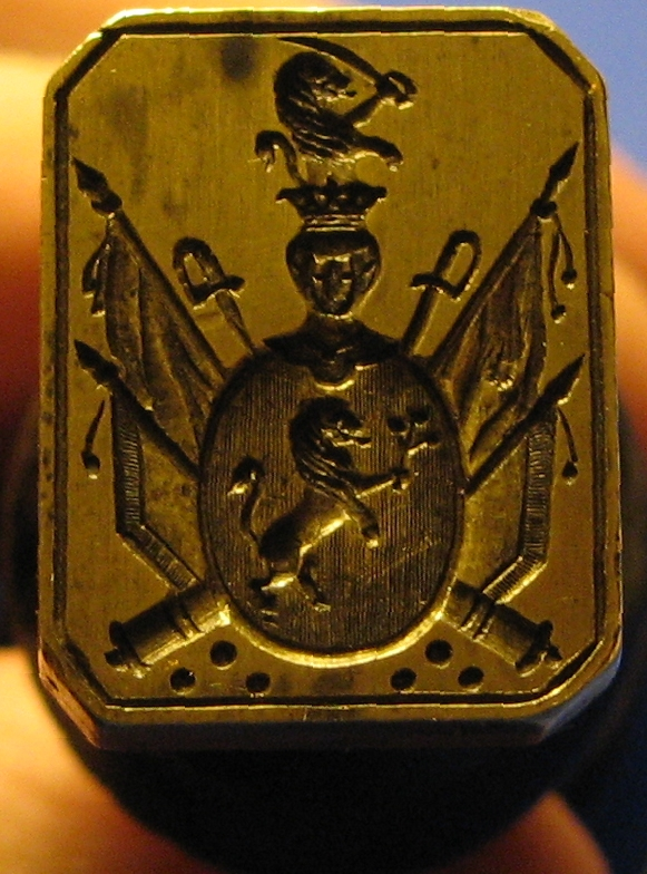 Pieczęć z herbem rodziny Janków - z archiwum rodzinnego.